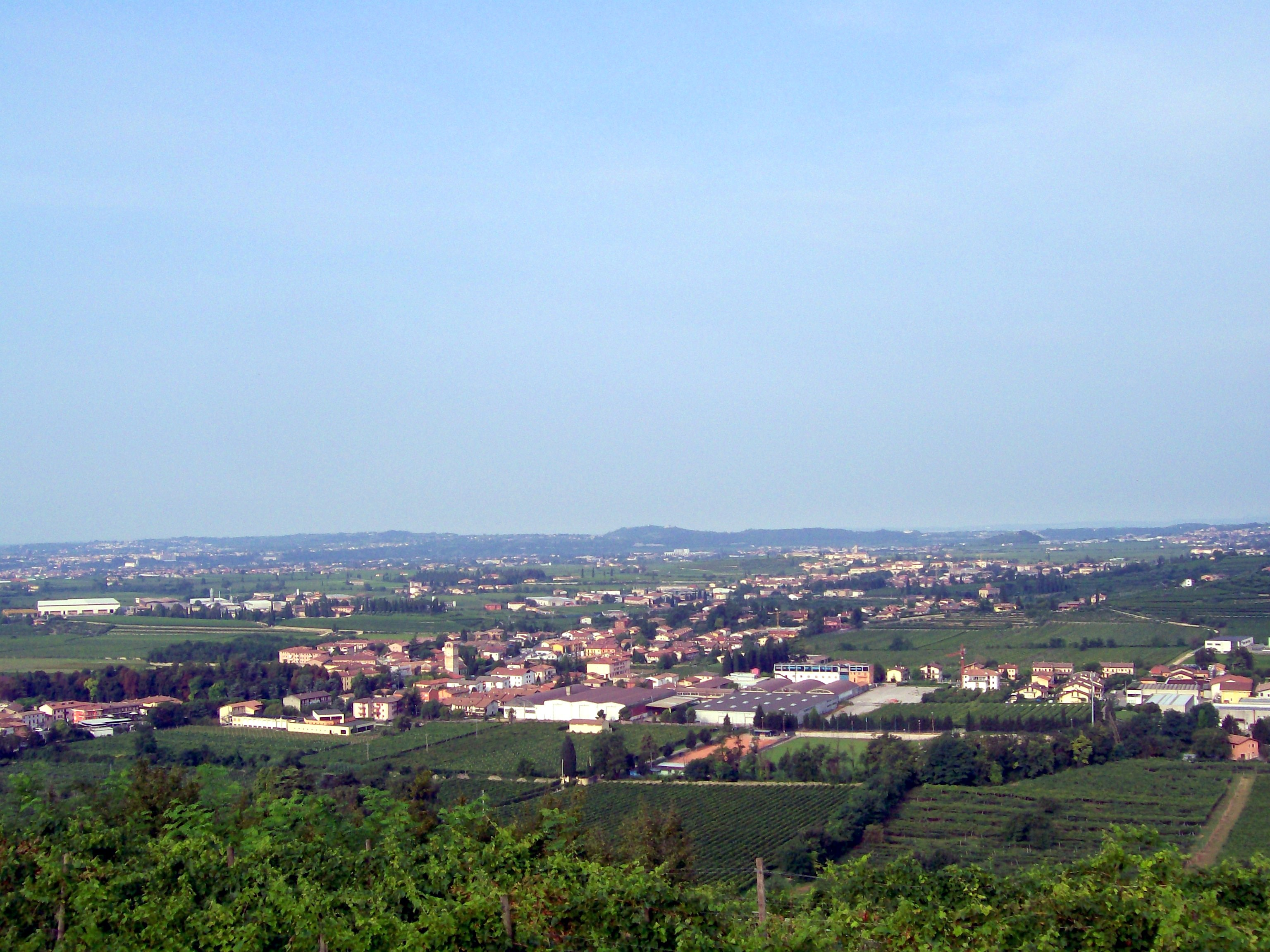 Vista di S. Floriano dalle colline circostanti.